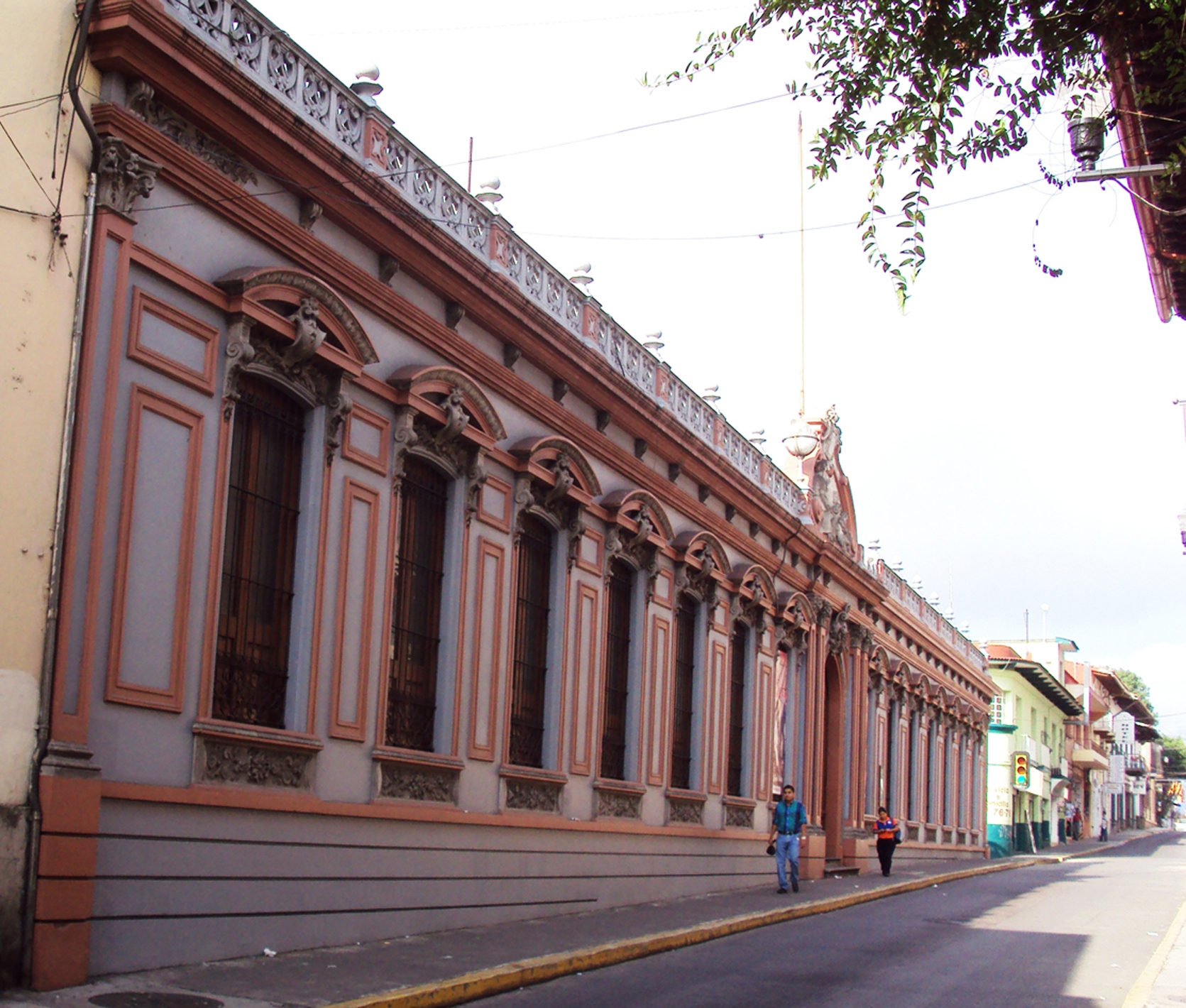 Actualmente es conocido popularmente como la "prepa Juárez"